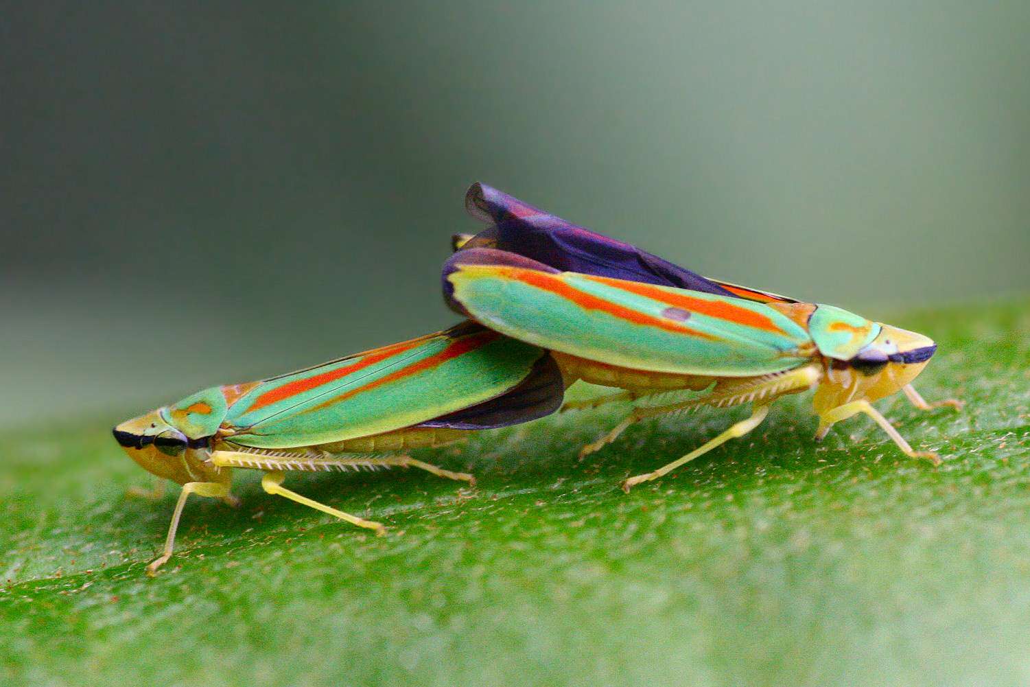 Rhododendron-Zikade (Graphocephala fennahi)